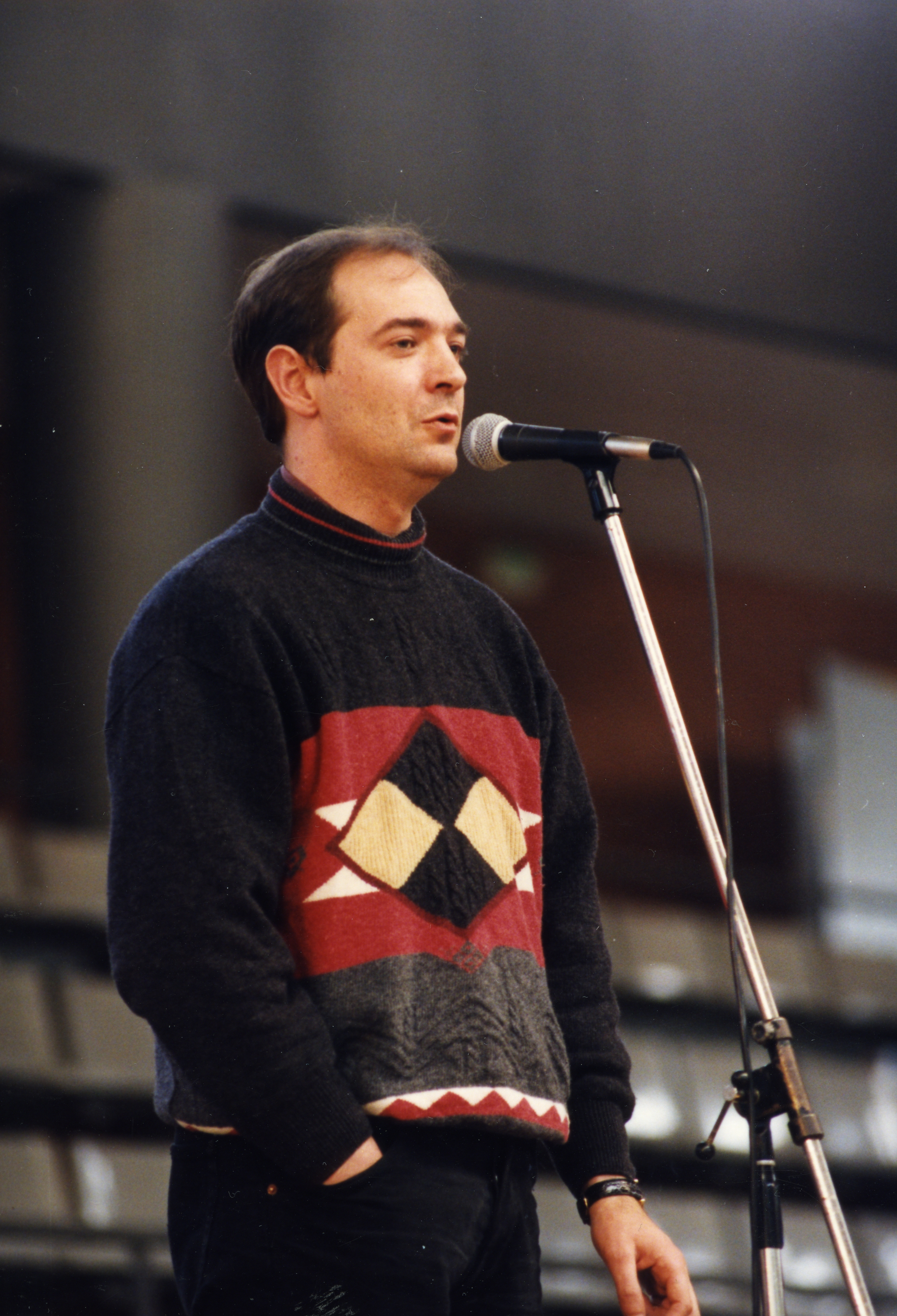 Andoni Egaña. Aiurri 11 zbk. 5. orr.